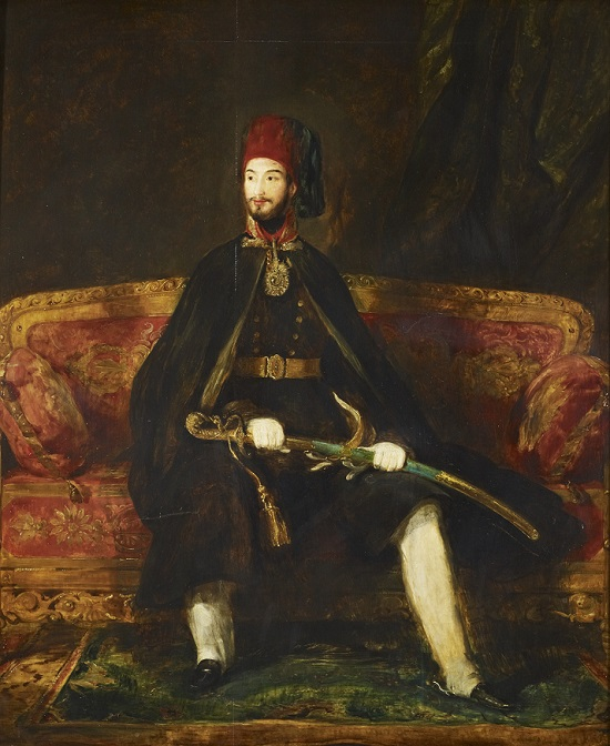 Abd-ul-Mejid (1823-1861), Sultan of Turkey